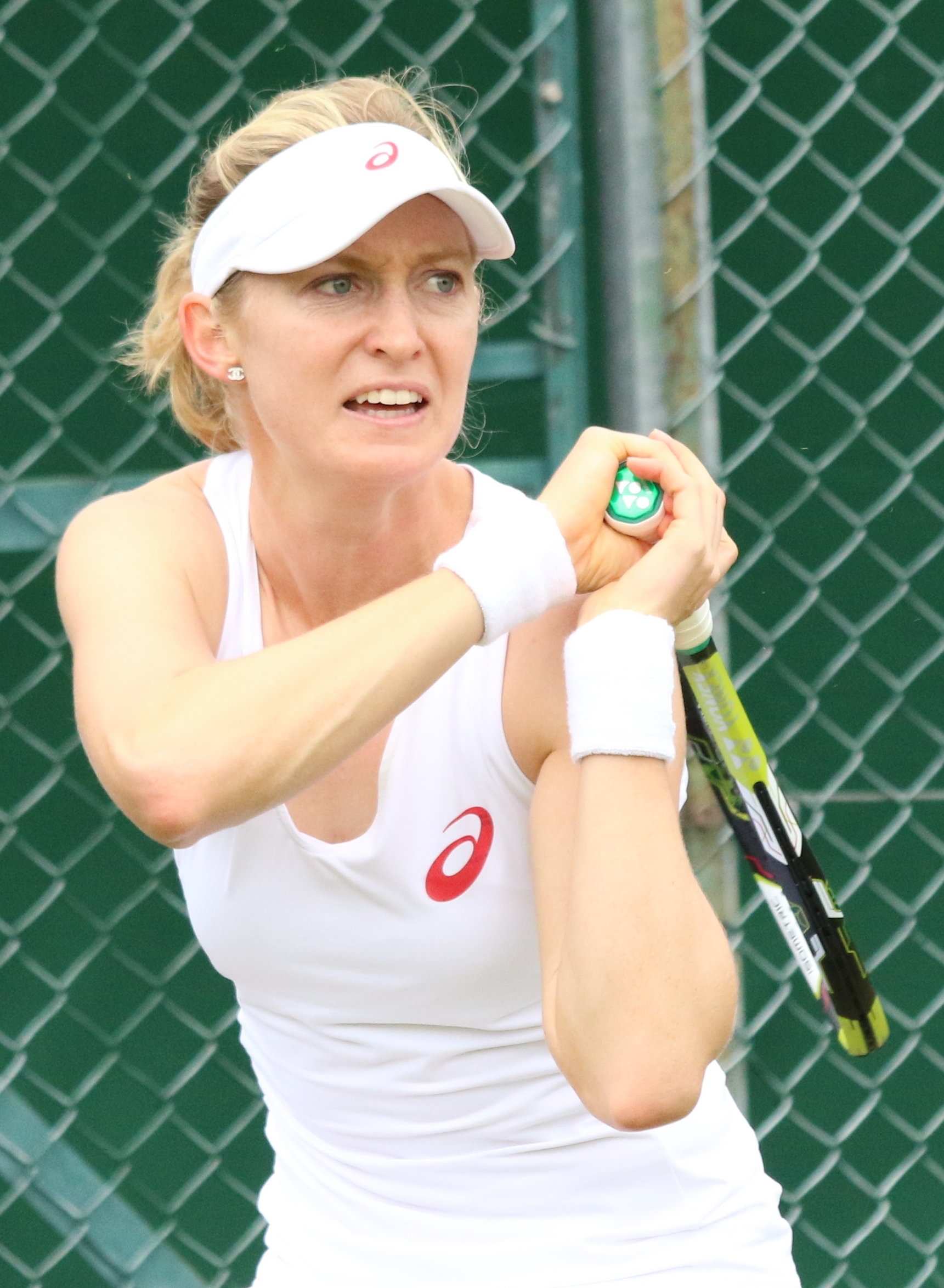 Boserup WMQ16 (1)